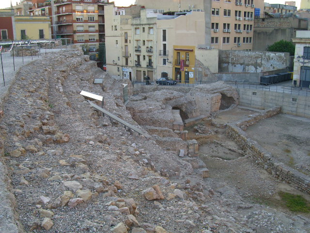 Zona restos Circo Romano, Tarragona, novembro 2009